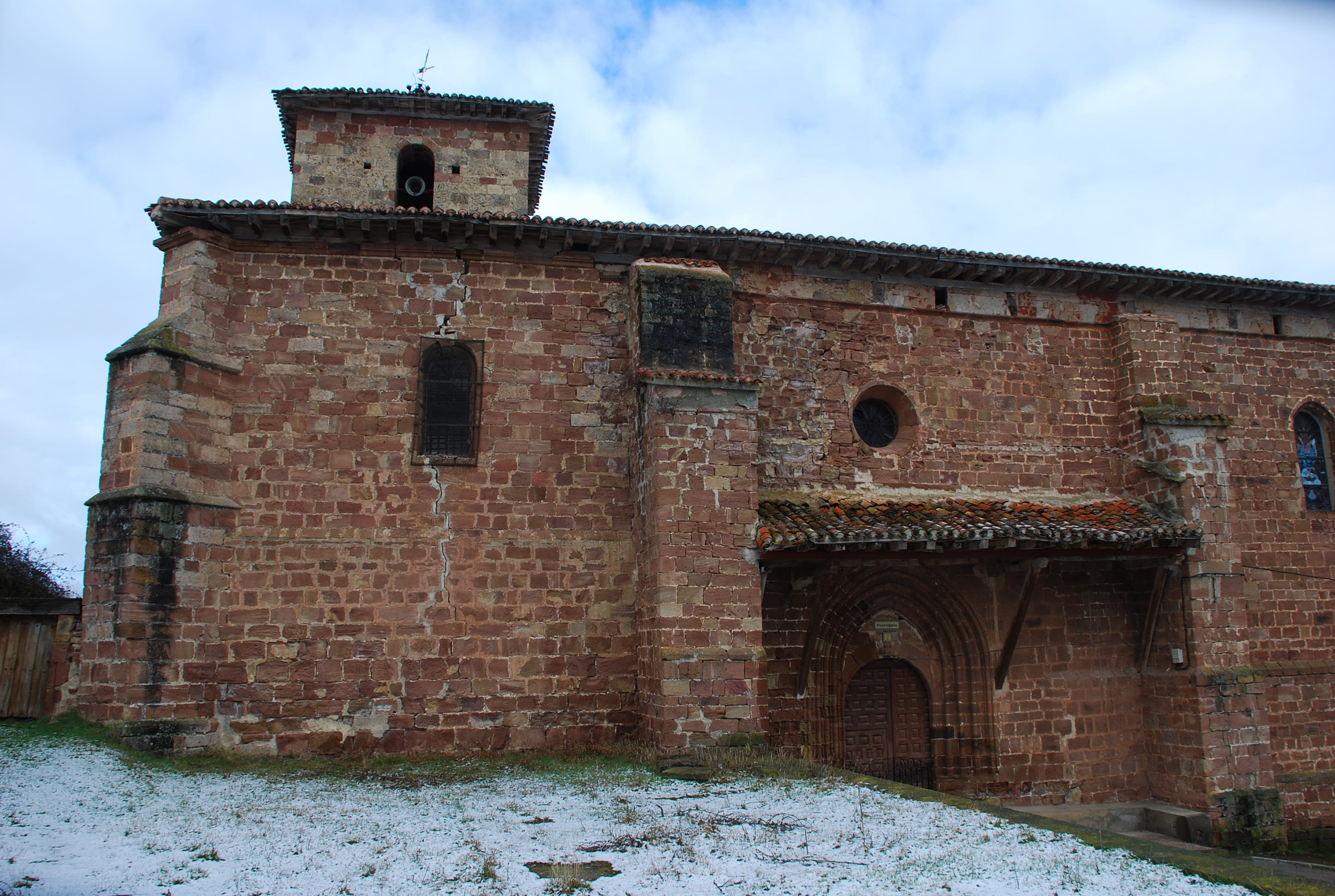 Iglesia de la Asunción en Fresneda (Burgos)